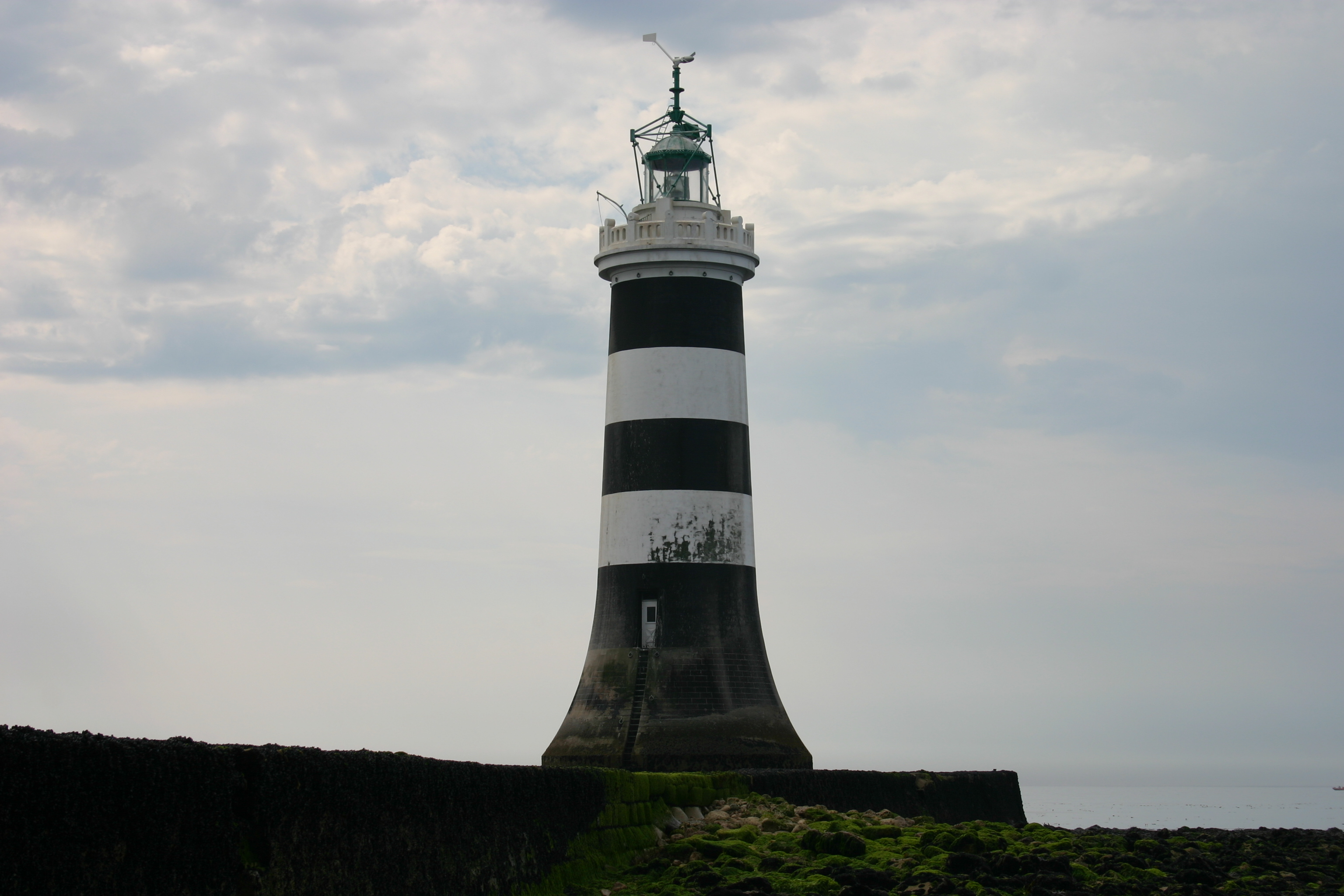 Phare de la Banche (Inscrit) .